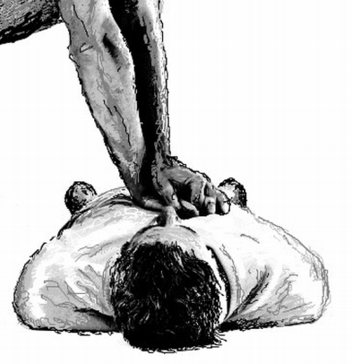 Vonkajšia masáž srdca